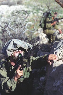 לוחמים מיחידת אגוז באימון לחימת סלעים.